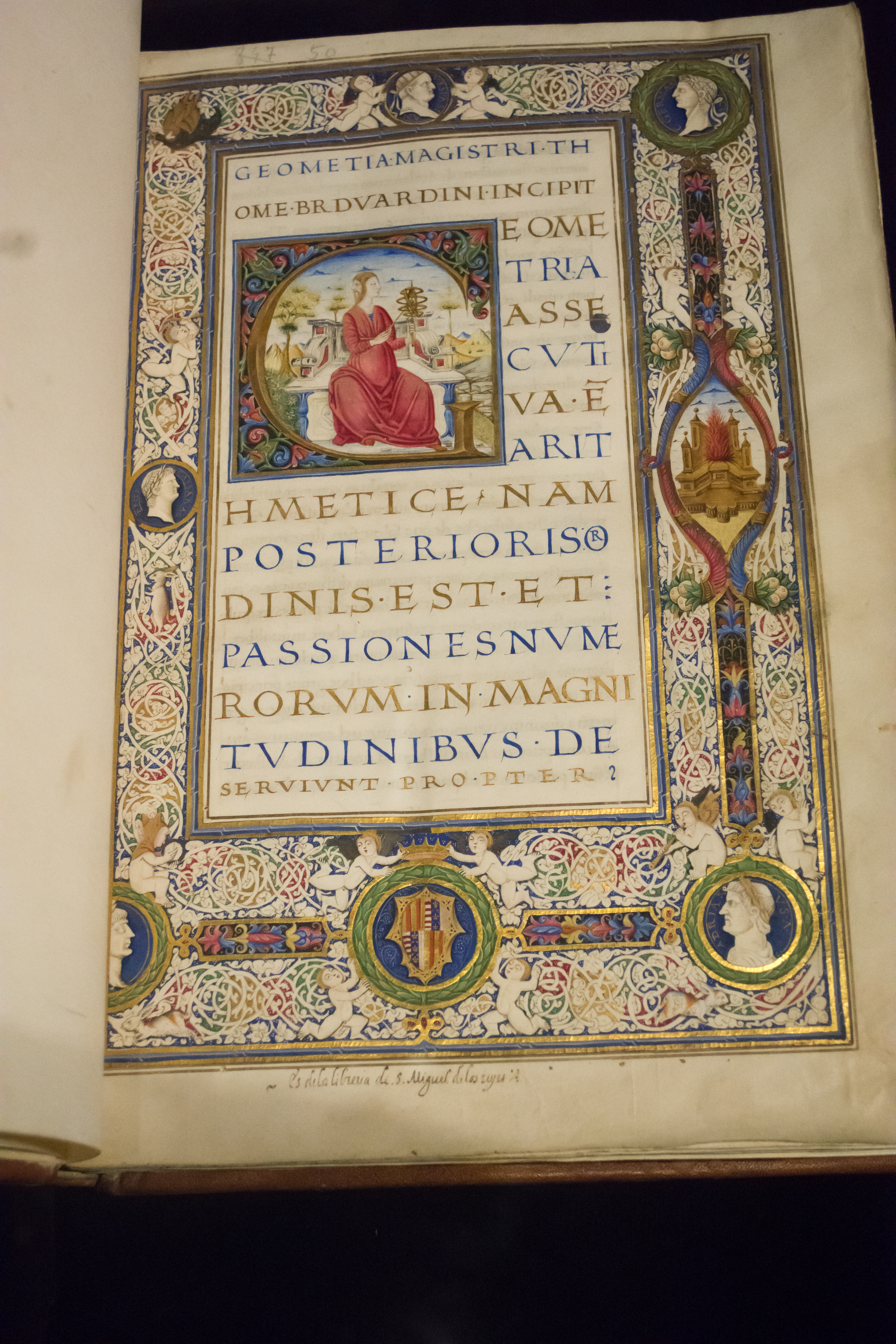 Se trata de una obra capital del humanismo, iluminada en el taller de Cola Rapicano. El códice transcribe las obras de Thomas Bradwardine, Geomtetria speculativa, y de Johannes Peckham, Perspectiva communis. Las dos obras incorporan dibujos geométricos ilustrativos. Decoración: orla renacentista, miniada en oro y colores, con cinco medallones con los bustos de cinco emperadores (Nerón, Vespasiano, Germánico, Adriano y un quinto que no ha sido identificado). en la parte inferior, escudo de los soberanos de Nápoles sostenido por cuatro putti. En la primera letra capital se representa la alegoría de la Geometría bifronte (con rostros de dama y de Euclides). Encuadernación: siglos XV. Tafilete sobre madera, grabado y con dorados, restos de cierres y cantos dorados. Procedencia: Nápoles. Escritura humanística antiqua. 90 folios. 325 x 224 mm, encuadernación 340 x 325 mm. Colección Duque de Calabria. Universidad de Valencia. Biblioteca Histórica. BH Ms. 50.